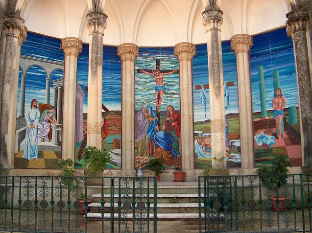 Mosaico del Calvario - Soleto